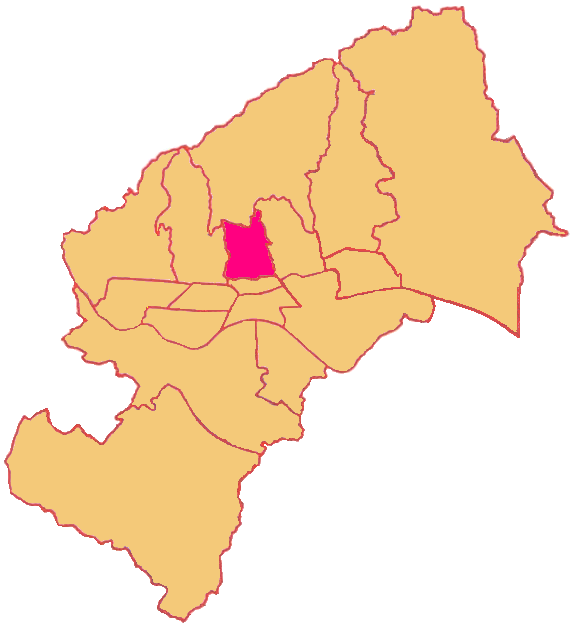 Map of Gornji grad-Medveščak District in Zagreb (Gradska četvrt Gornji grad-Medveščak)